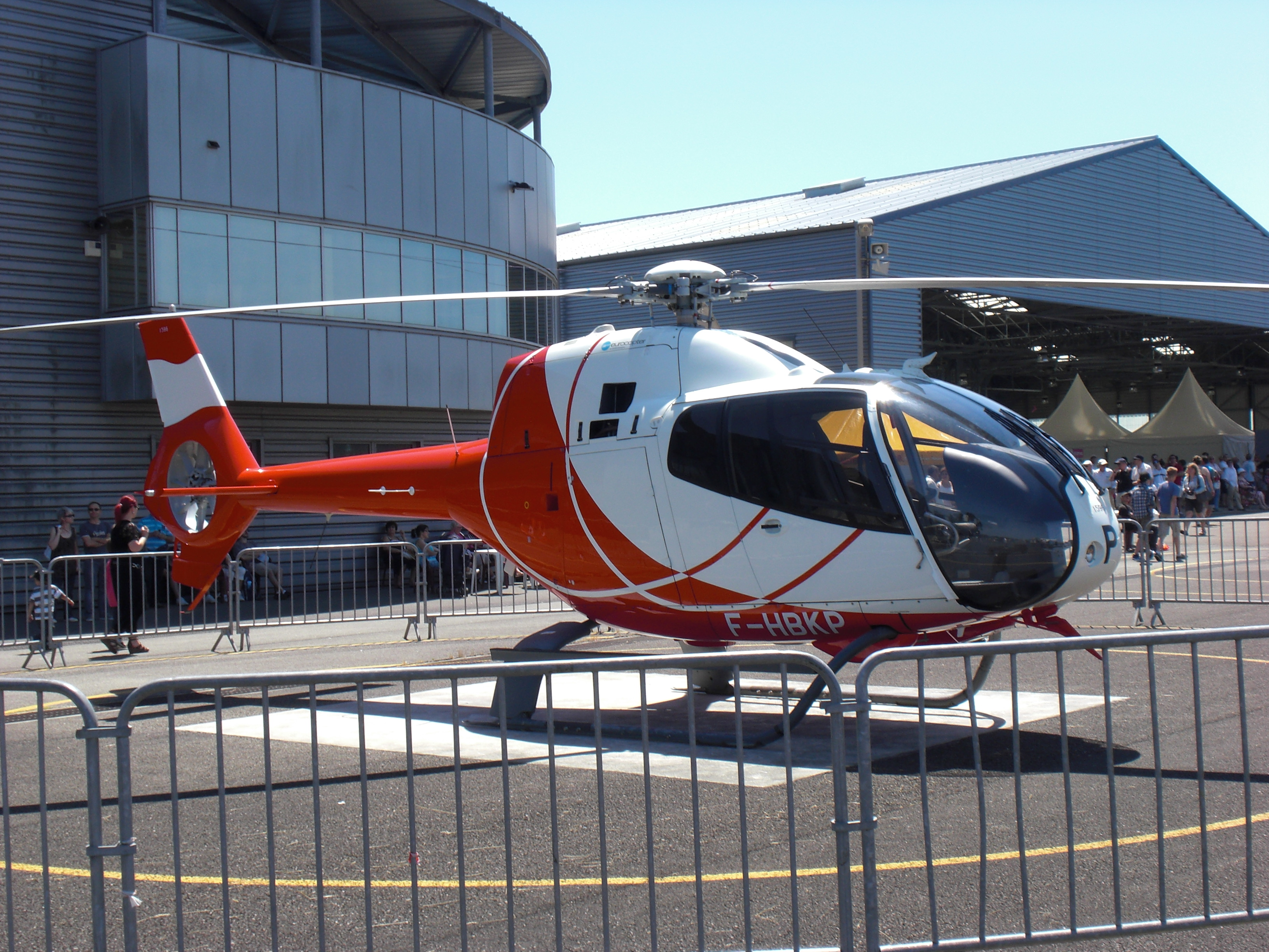 Hélicoptère de type Eurocopter EC-120B Calliope, immatriculation F-HBKP, stationné sur la base militaire de l'aérodrome de Dax-Seyresse. Exposé lors de la Fête de l'Hélicoptère 2012.